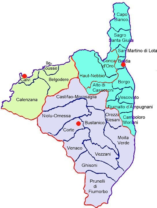 Arrondissements de Haute-Corse. Divisions administratives, localisation des arrondissements, cantons électoraux. Corsu: E ghjure bastiacce, calvesi è curtinesi